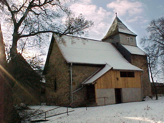 Stedten an der Ilm, Kirche St. Eckard, Kirchhof und Kirche im Winter